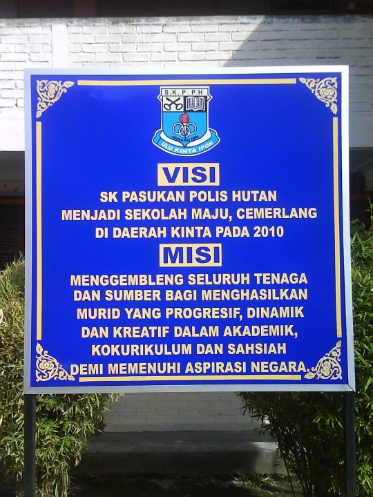 Foto ini telah diambil oleh Darul Ridzwan Azhar di SKPPH semasa pendaftaran darjah 1 bagi sesi tahun 2010.